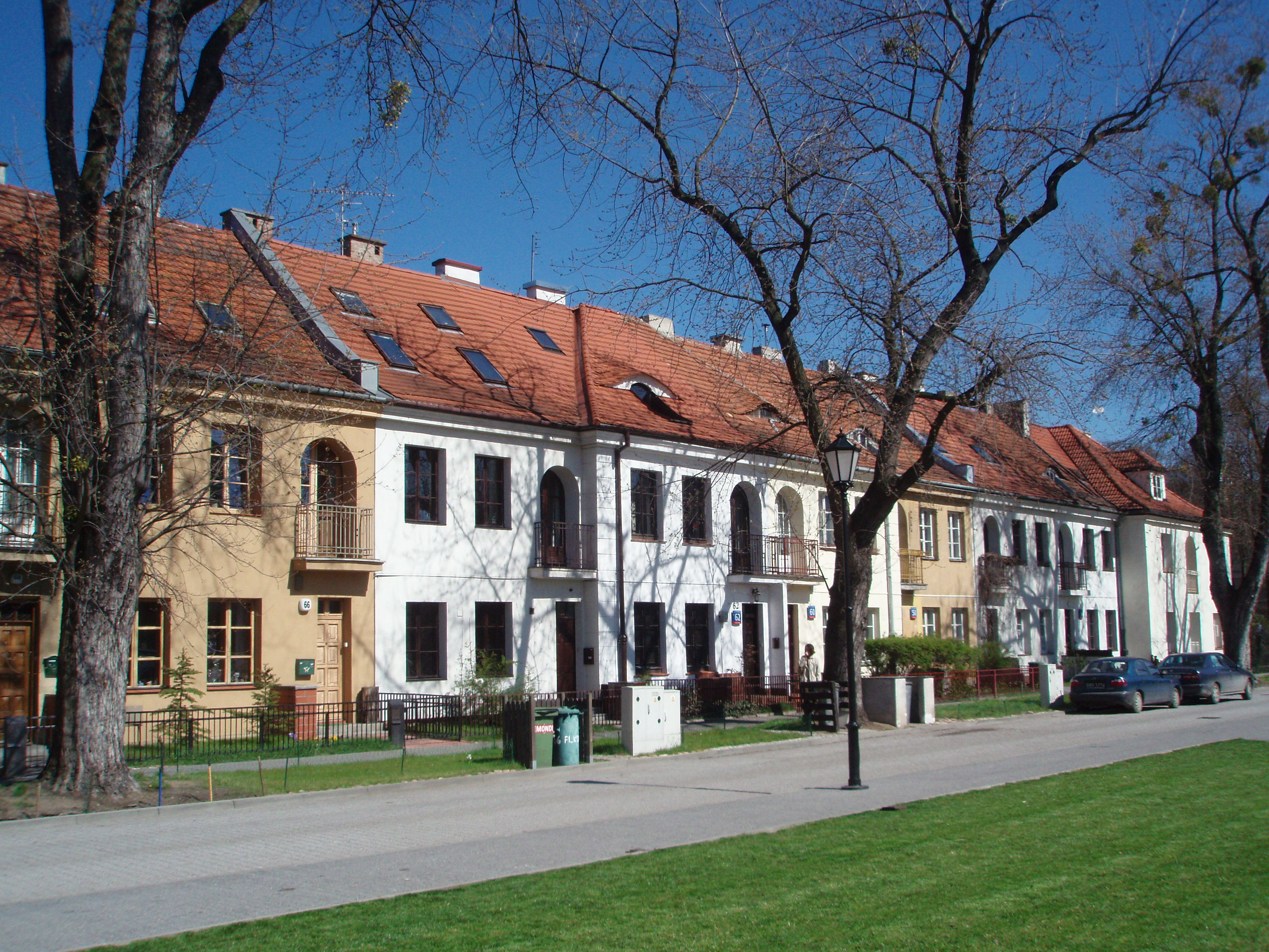 Warszawa Bielany, plac Konfederacji.